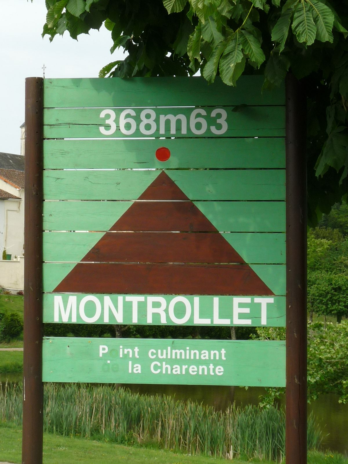 panneau "point culminant" de Montrollet, Charente, France